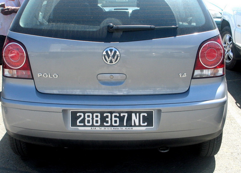 Photo d'une immatriculation de la Nouvelle Calédonie